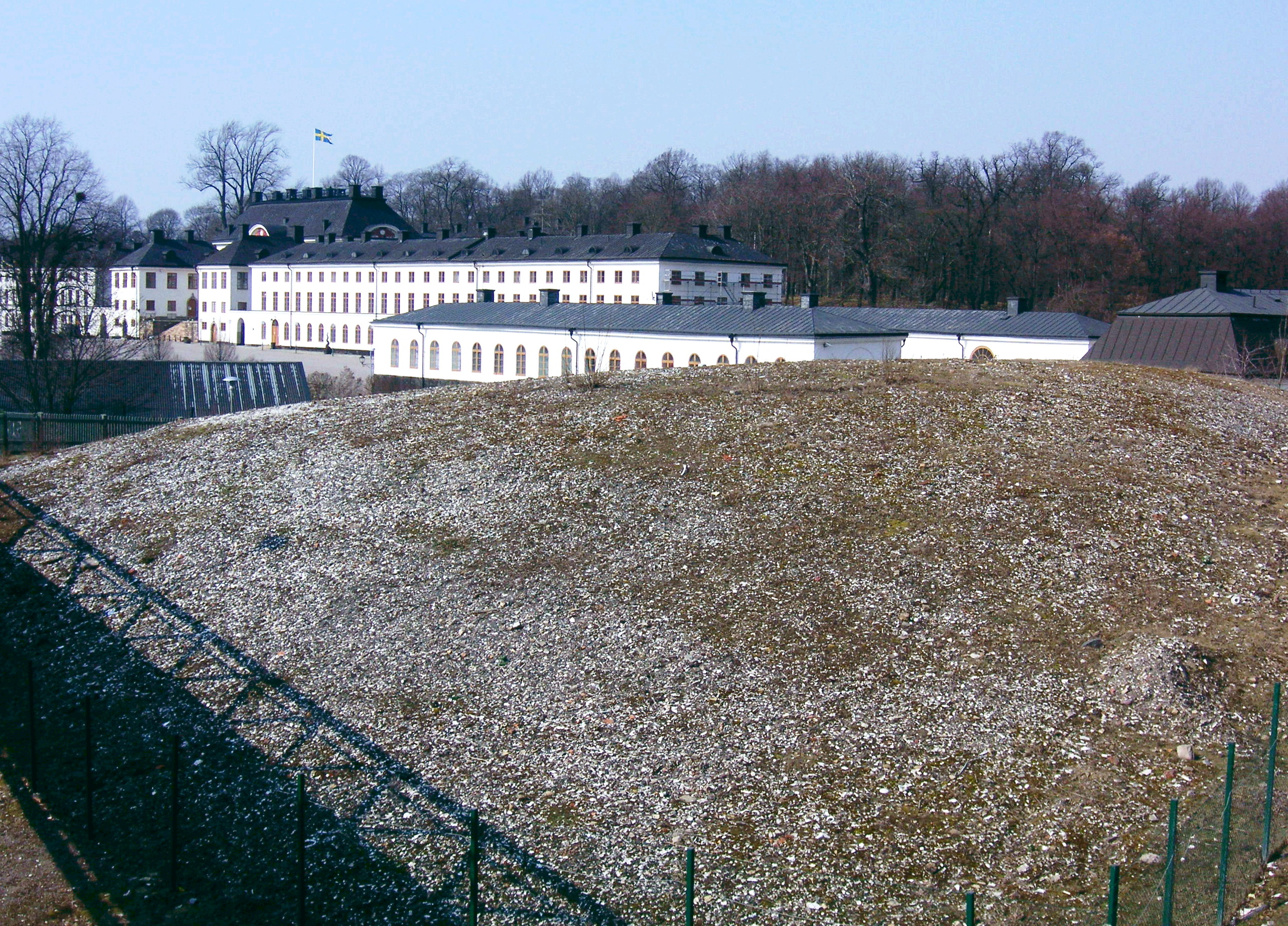 Rörstrands porslinstipp i Vasastan i Stockholm. I bakgrunden syns Karlbergs slott i Solna.